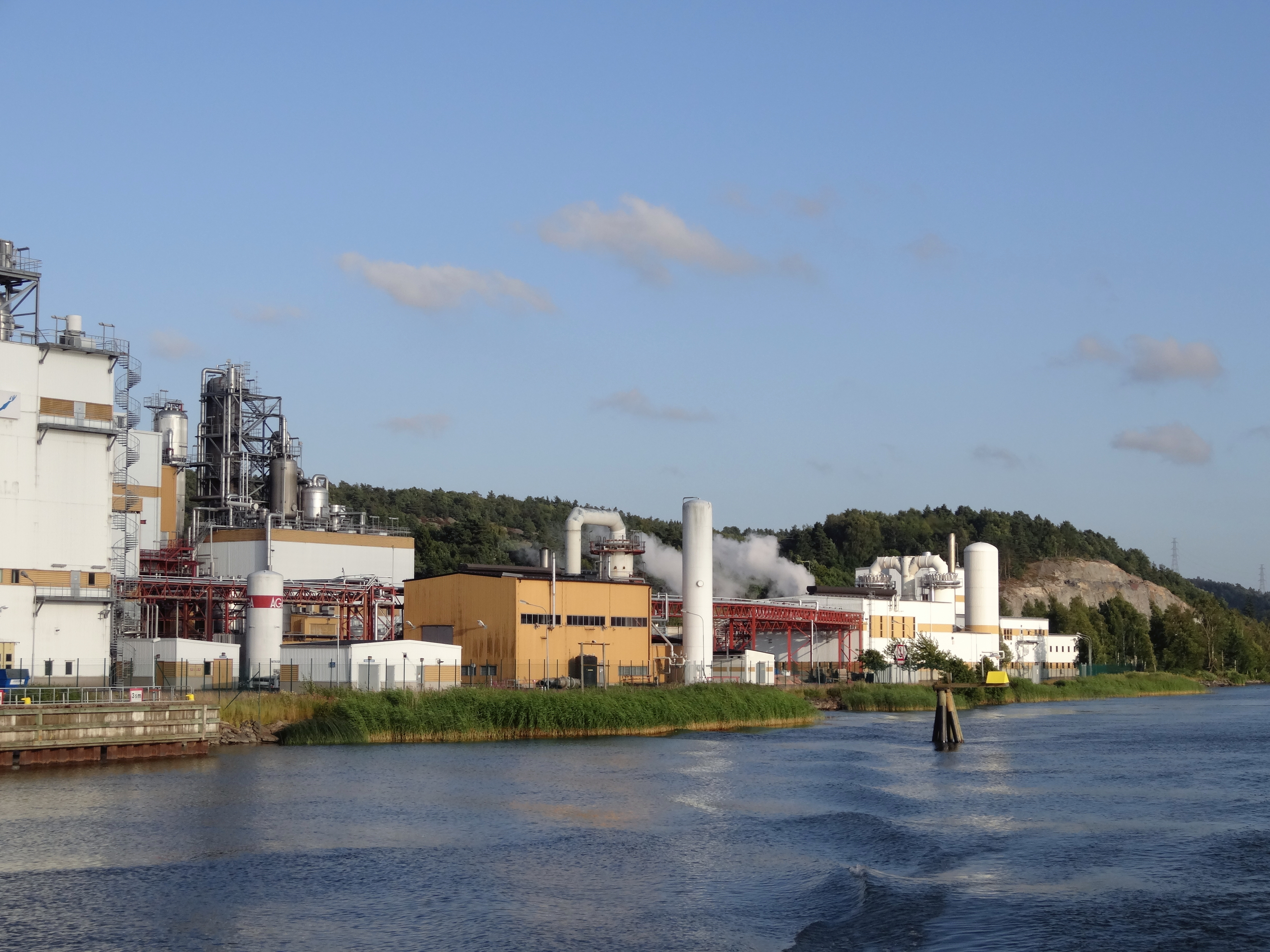 AkzoNobel Pulp and Performance Chemicals ABs (f.d. Eka Chemicals) anläggning vid Göta älvs strand i Bohus, Ale kommun.